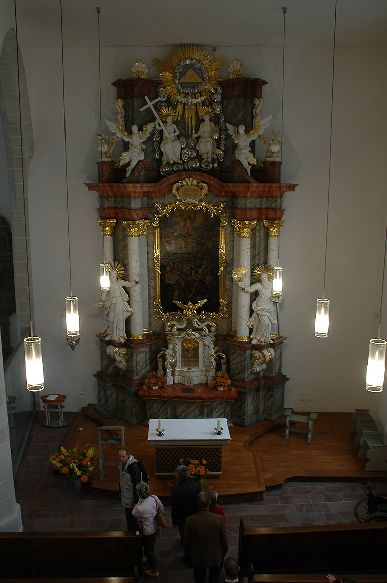 Barockaltar der Allerheiligenkirche an der Ecke Marktstraße/Allerheiligenstraße in Erfurt